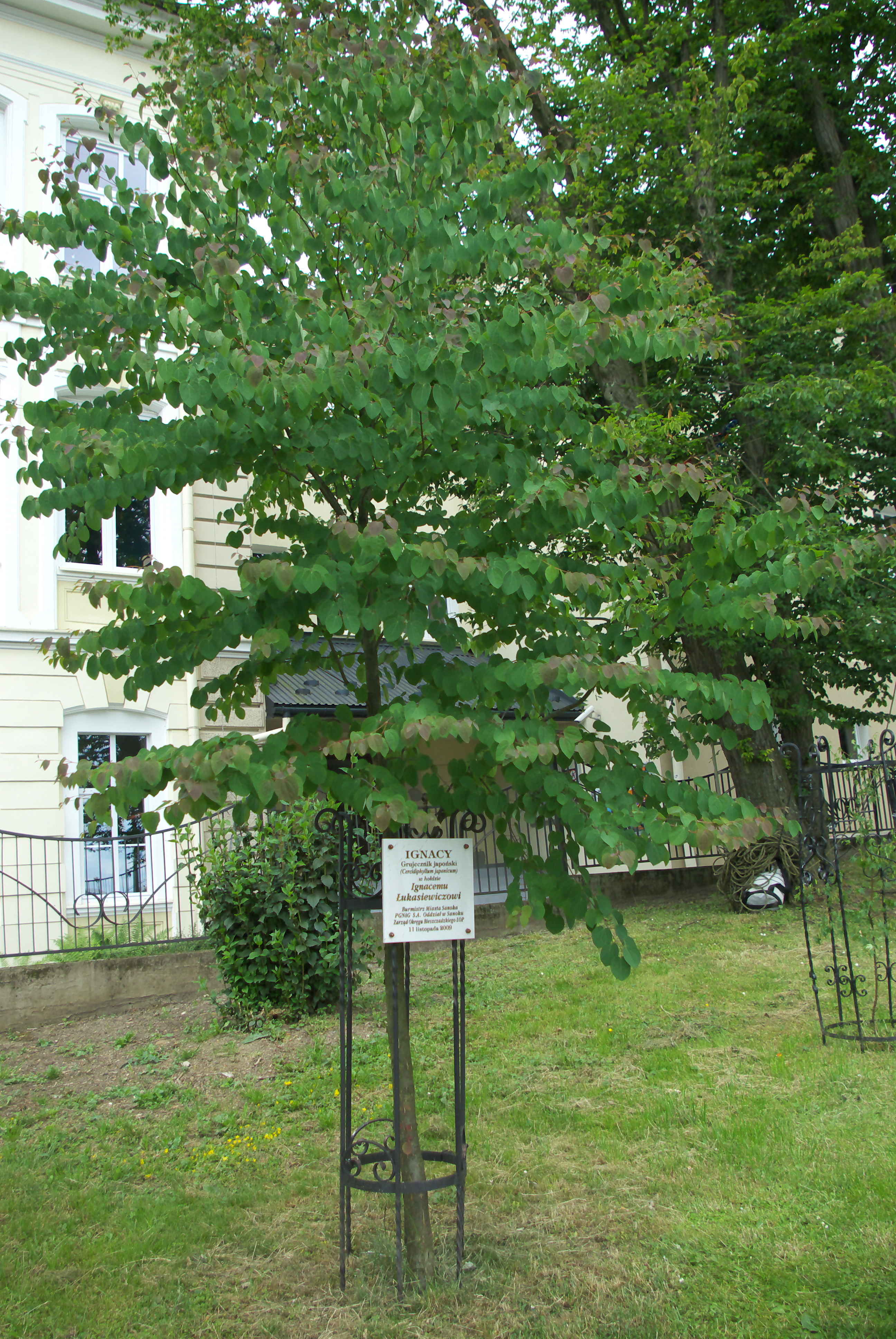 Grujecznik japoński (cercidiphyllum japonicum) poświęcony Ignacemu Łukasiewiczowi przy Placu Harcerskim w Sanoku